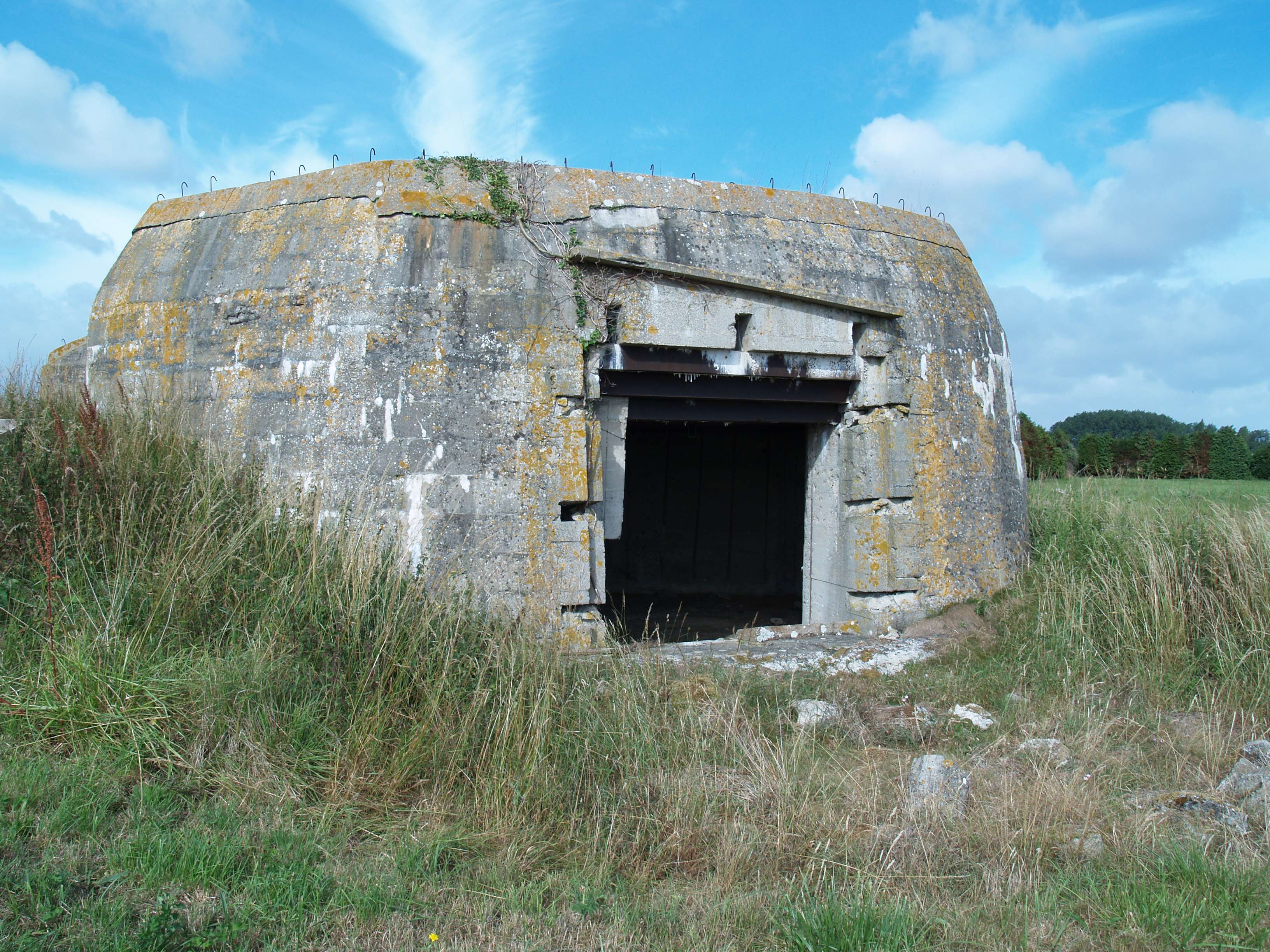 La Marefontaine Battery